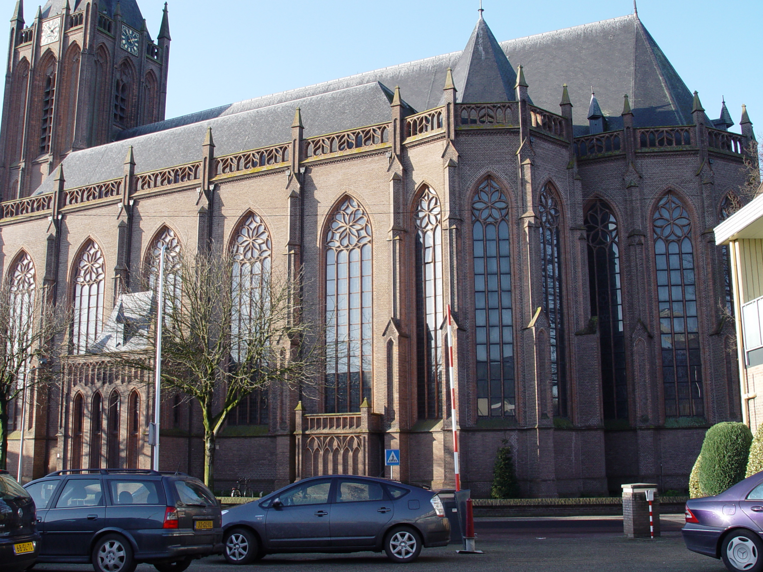 Raalte - Basiliek Kruisverheffing - anno 1892